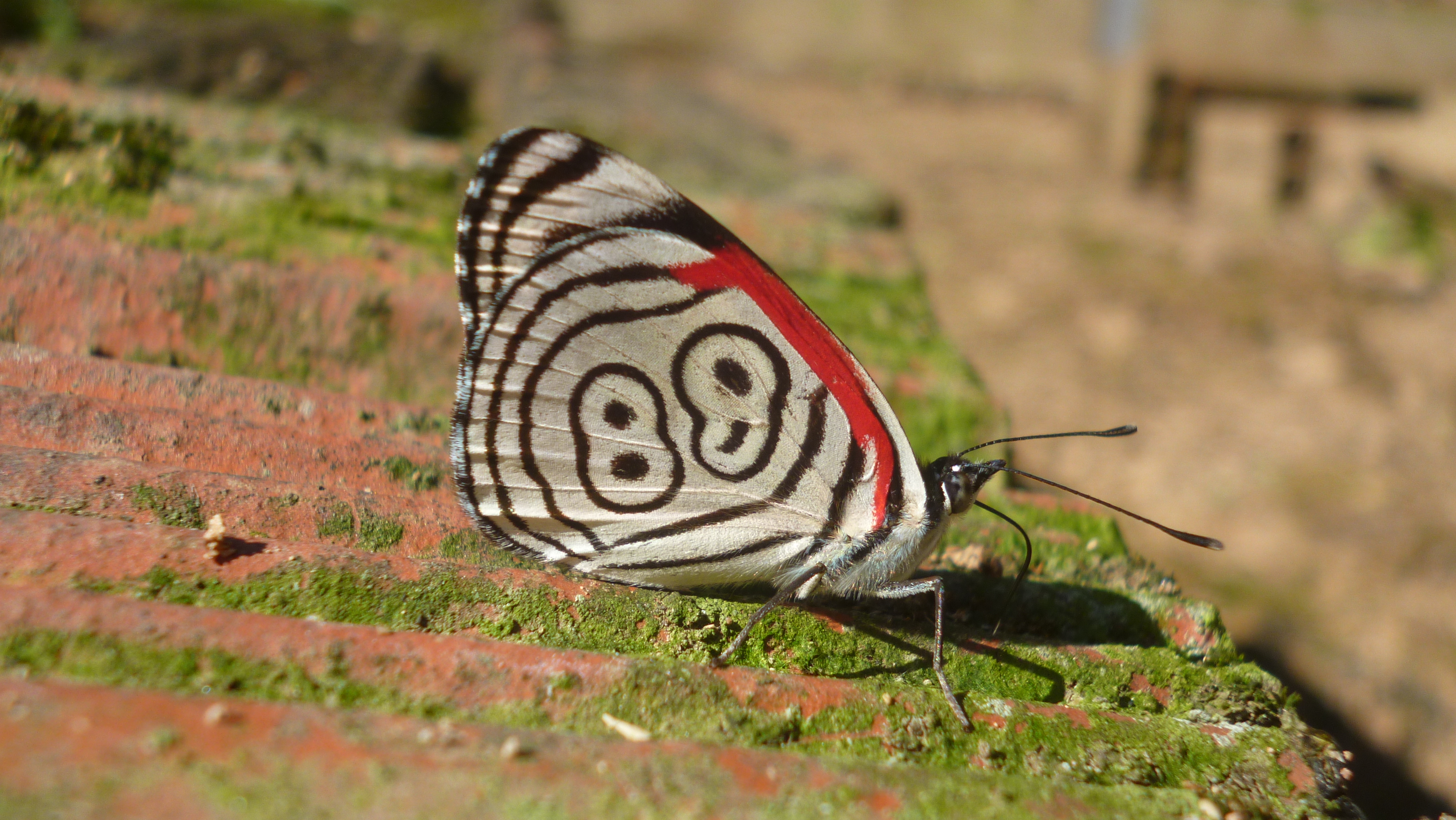 Foto tirada com uma câmera compacta Panasonic Lumix FH4, na propriedade de minha família.